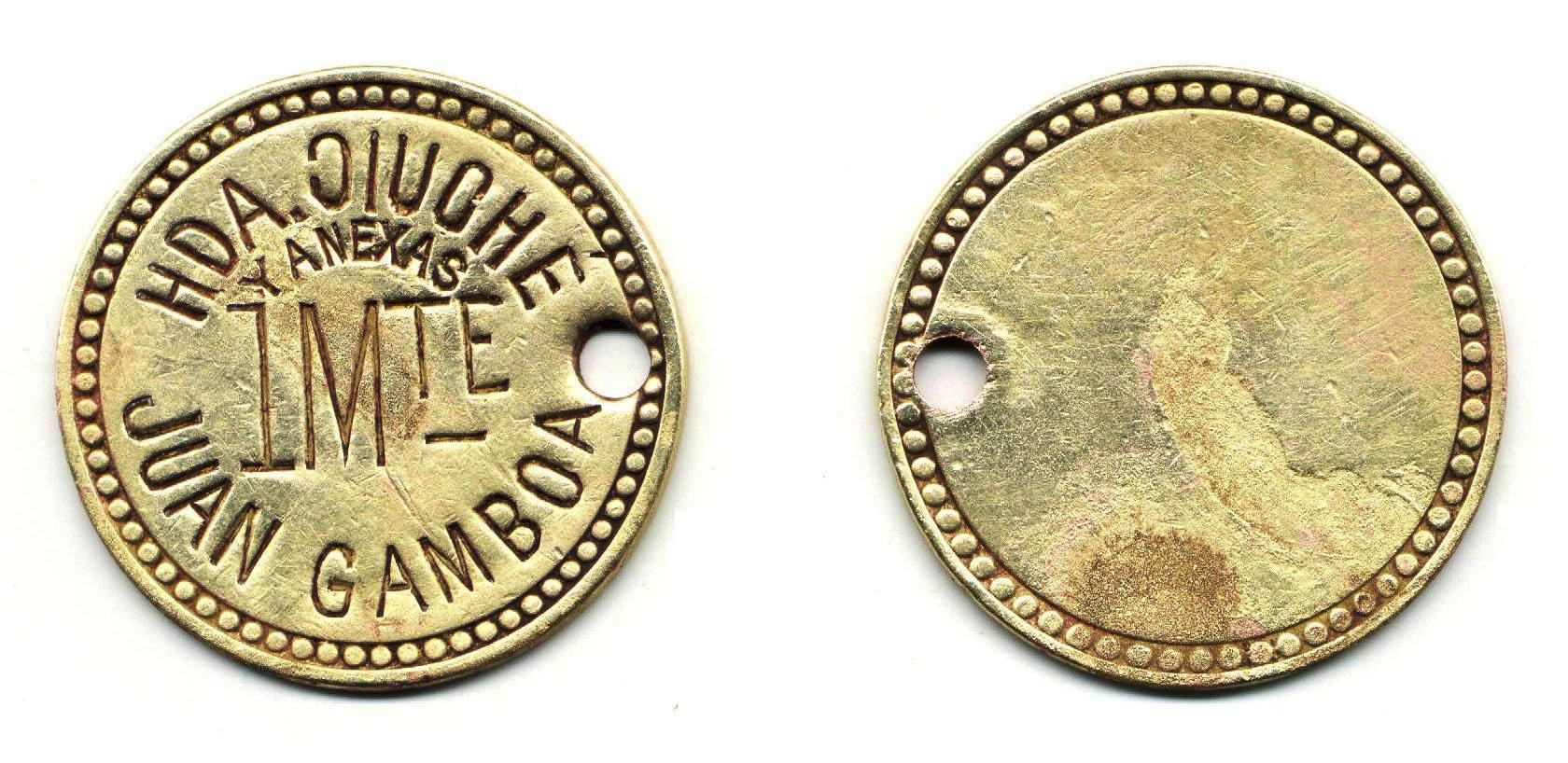 Ficha de hacienda equivalente a 1 mecate de "chapeo" (corte de maleza) expedida en la Hacienda Dziuché a finales del siglo XIX. A los peones de la haciendas se les pagaban sus labores con fichas las cuales eran canjeables con mercancía y víveres en las tiendas de raya. La Hacienda Dziuché (ƆIUCHE) y anexas, propiedad de un tal Juan Gamboa, se encuentra entre Hoctún y Cacalchén, Yucatán.